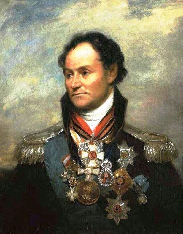 Count Matvey Platov (Портрет донского атамана Матвея Платова) Холст, масло, 76,5 х 63,5. Коллекция Константиновского дворца